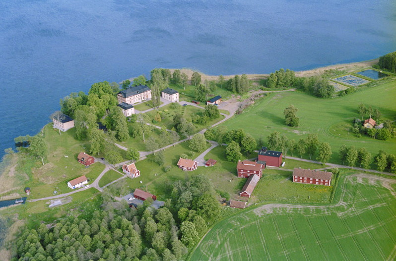 Åkerö säteri. Bilden är tagen mot (väderstreck): SO Motiv: Åkerö Nyckelord: Byggnadsminnen, Flygbilder, Riksintressen Kategori: Herrgårds-/slottslandskapÅkerö säteri. Bilden är tagen mot (väderstreck): SO.